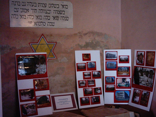 Dąbrowa Tarnowska-synagoga na Daszyńskiego wnętrze. autor:DDK